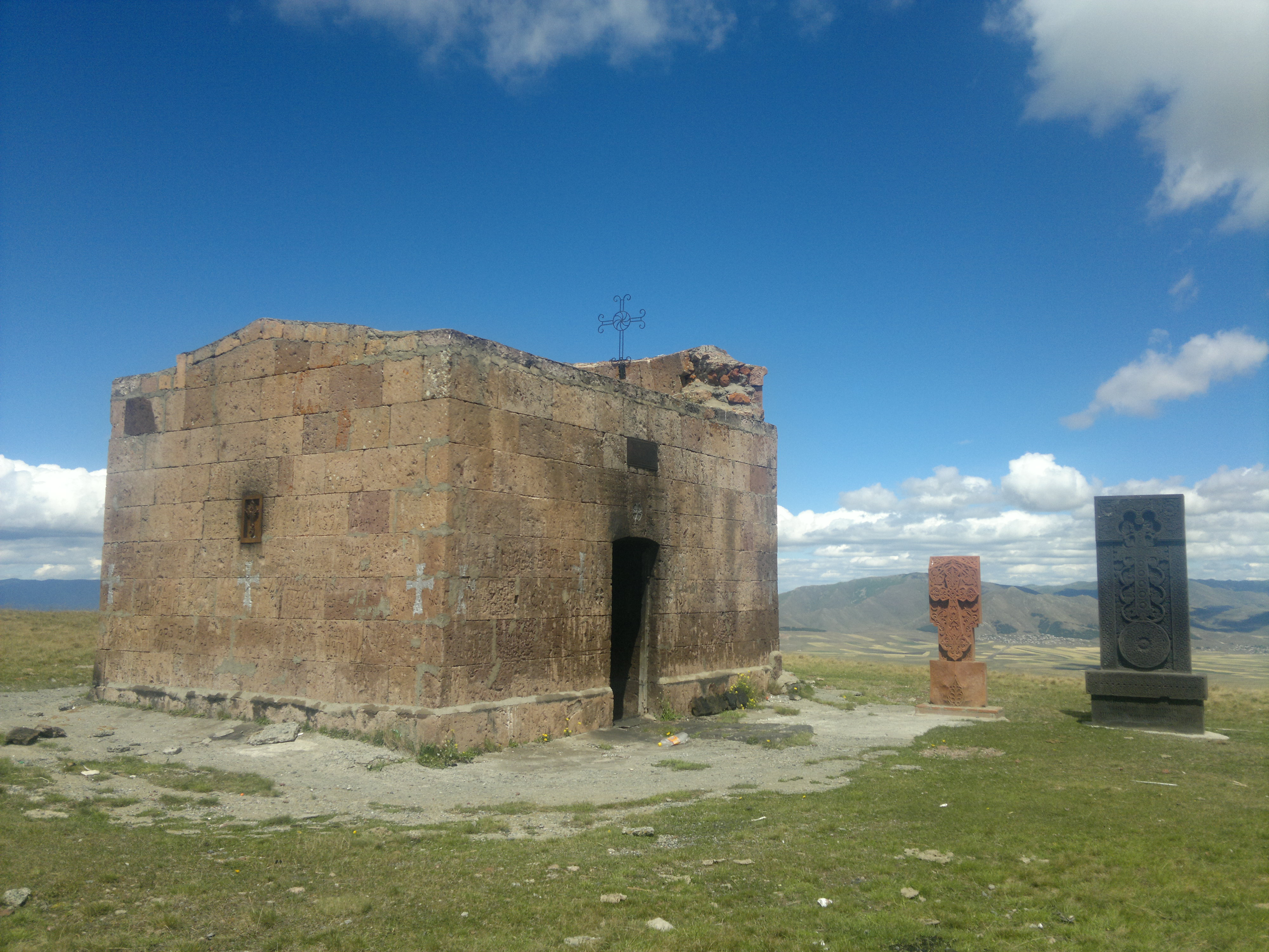 Եկեղեցի 27/3